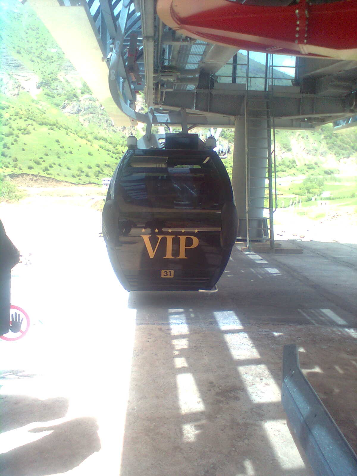 Heyran Gondola lift, Astara